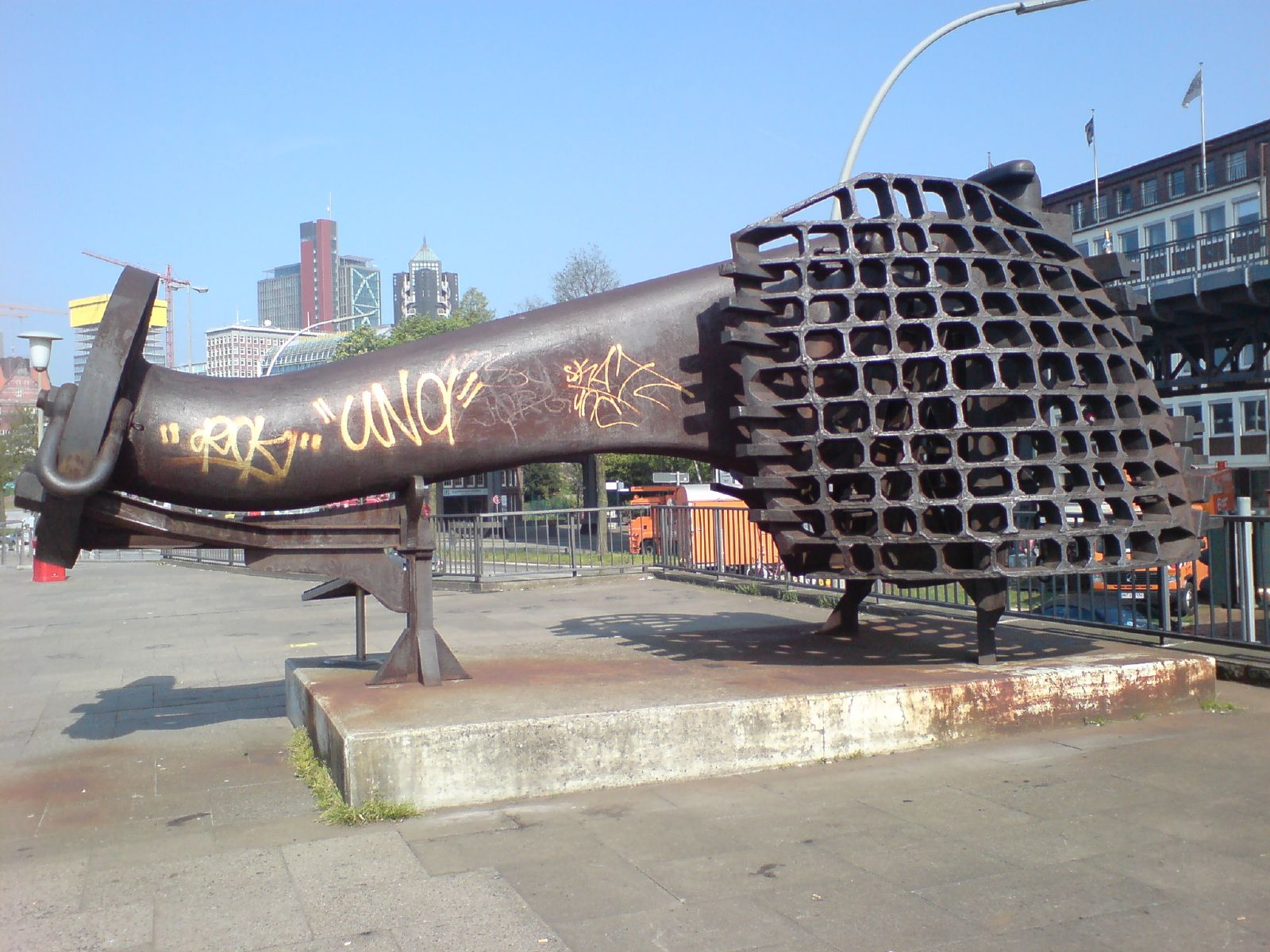 sculpture "Hafentorfigur" by Bernhard Luginbühl in Hamburg/Germany